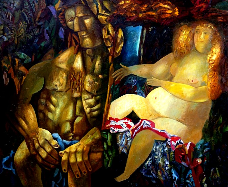 Картина "Самсон и Далила" (Из серии). Холст, масло. 150х120.